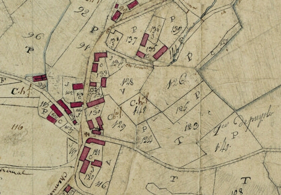 Extrait du plan cadastral napoléonien du bourg de Bourréac, daté de 1809